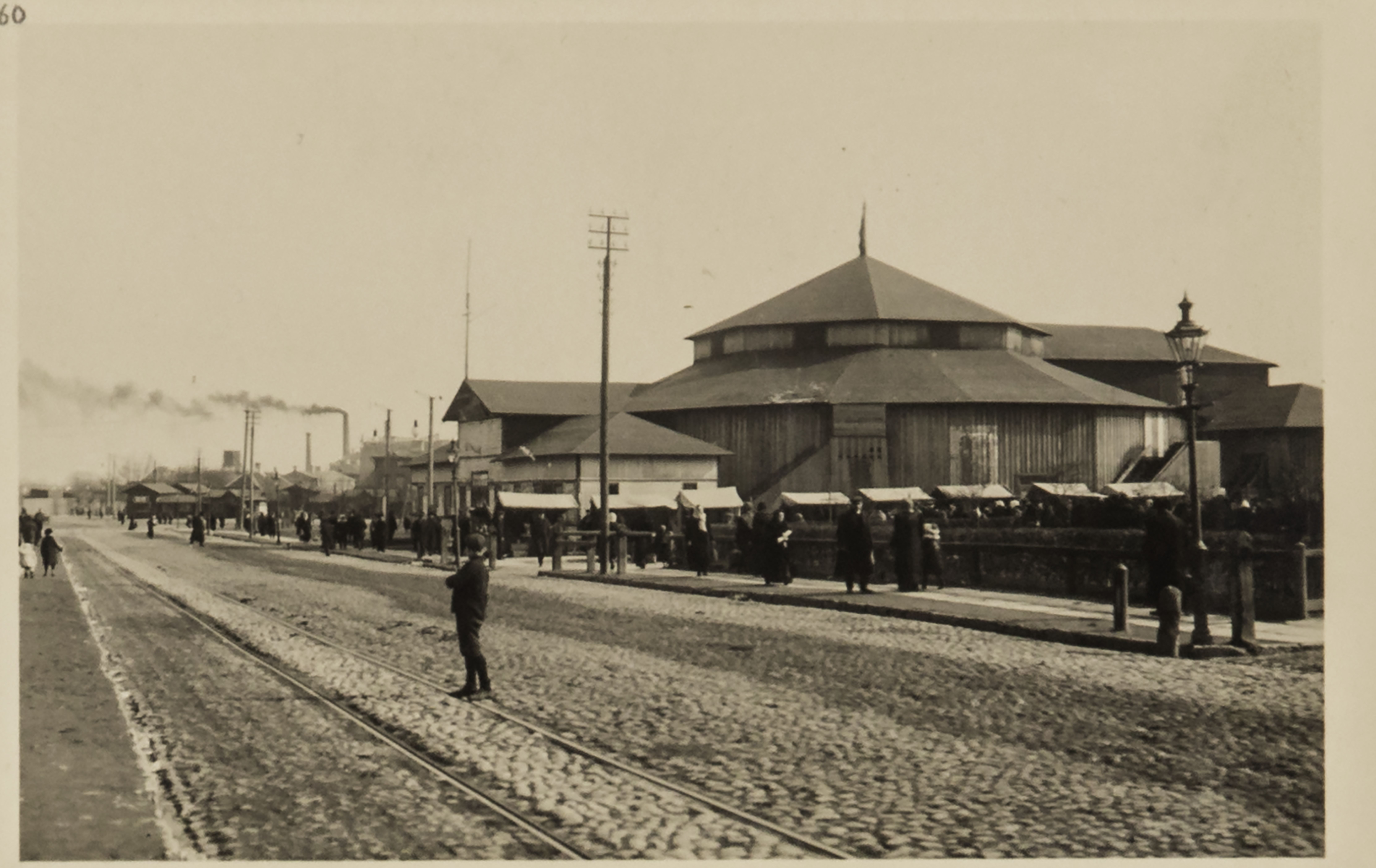 Tsirkusehoone Viru värava ees